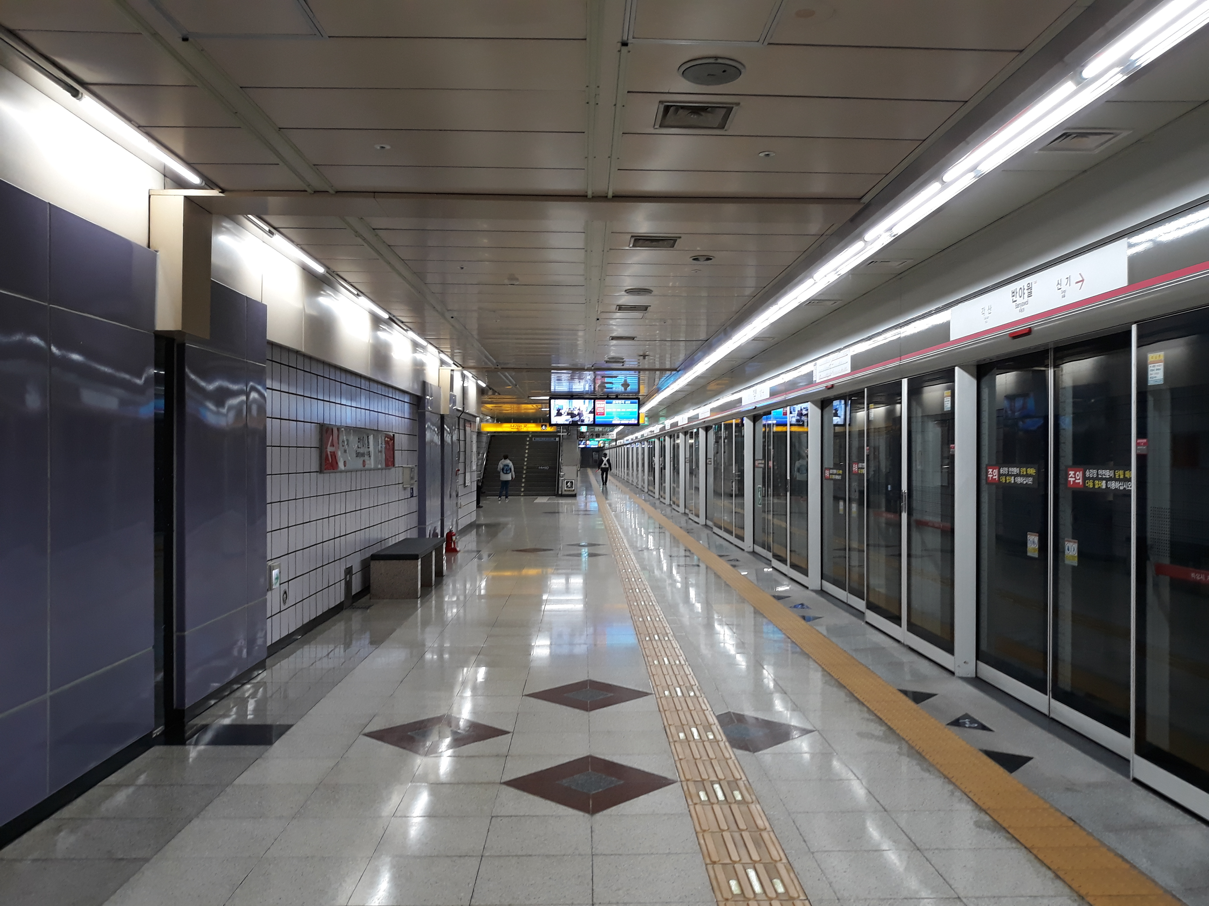 대구 도시철도 1호선 반야월역 설화명곡 방면 승강장